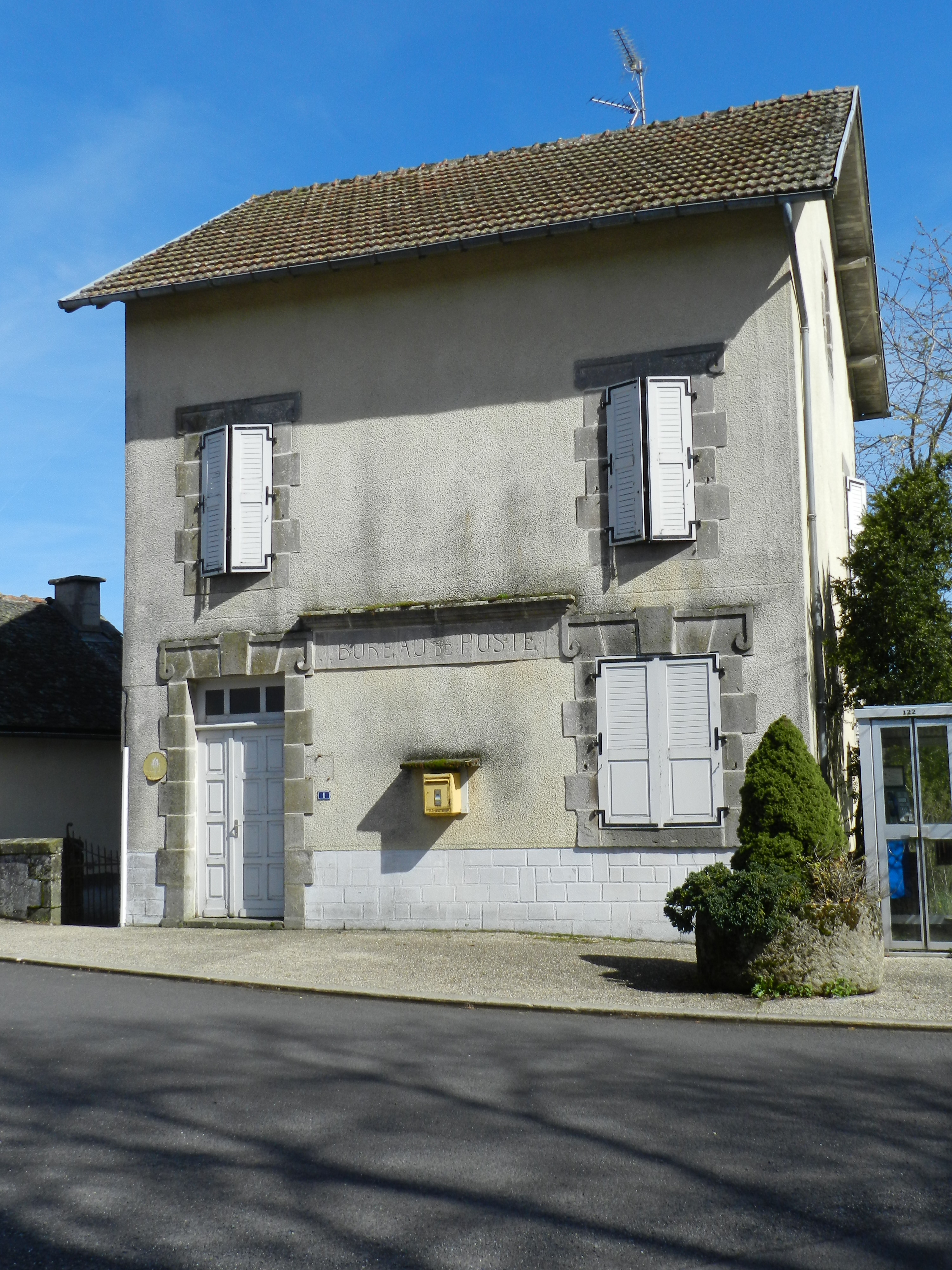 Le bâtiment qui a pendant de nombreuses années abrité le bureau de Poste ainsi qu'une bibliothèque. C'est aujourd'hui un logement particulier.